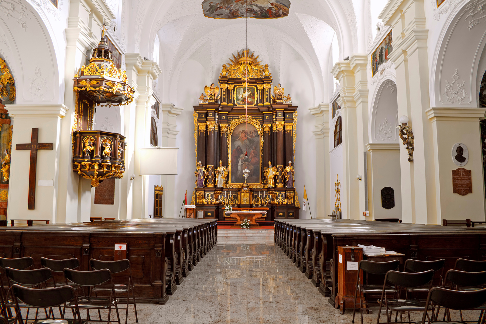 Szt. Anna templom (Debrecen, Szent Anna u. 15.) This is a photo of a monument in Hungary. Identifier: 5279